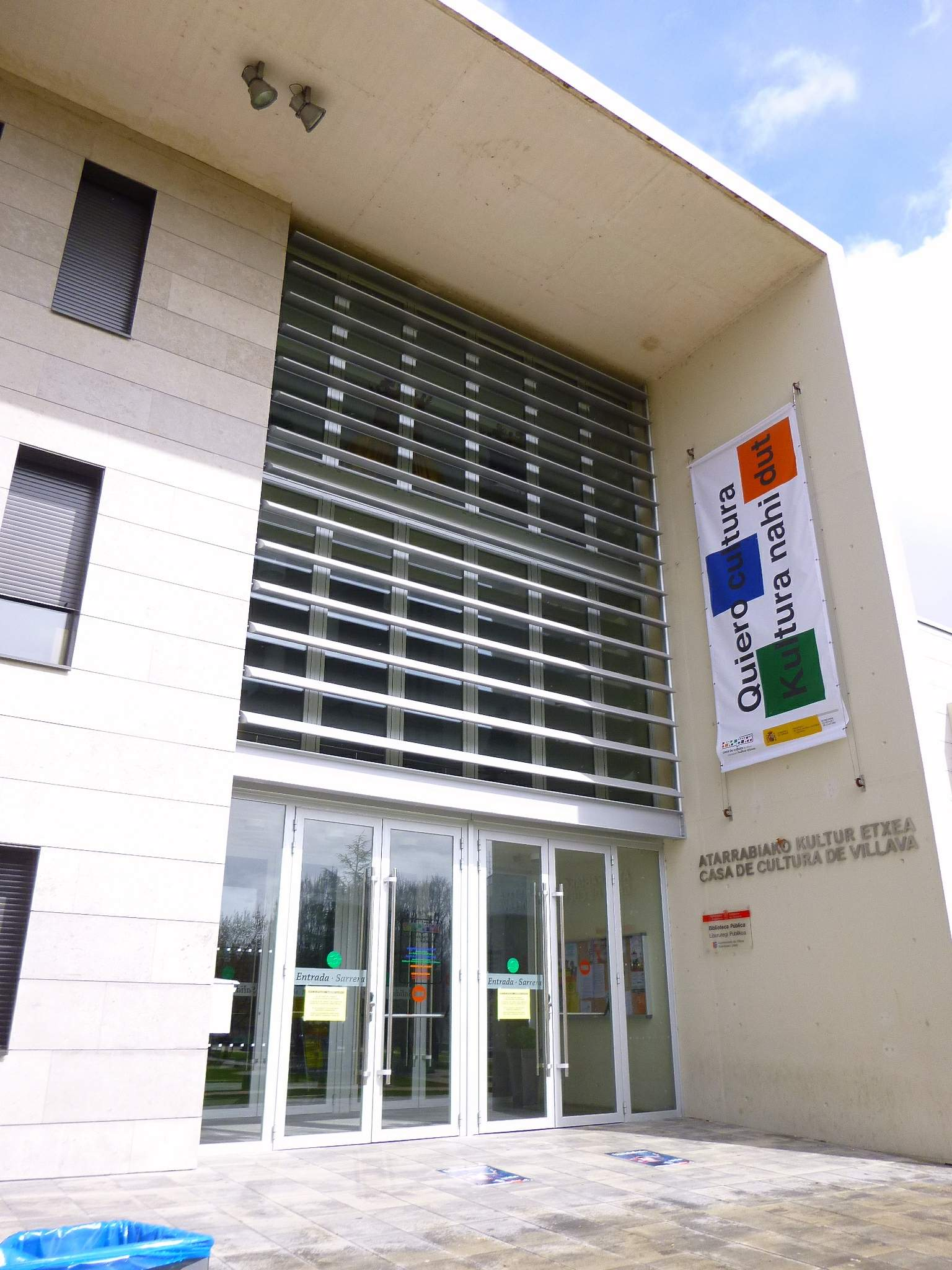 Casa de la Cultura de Villava (Navarra)